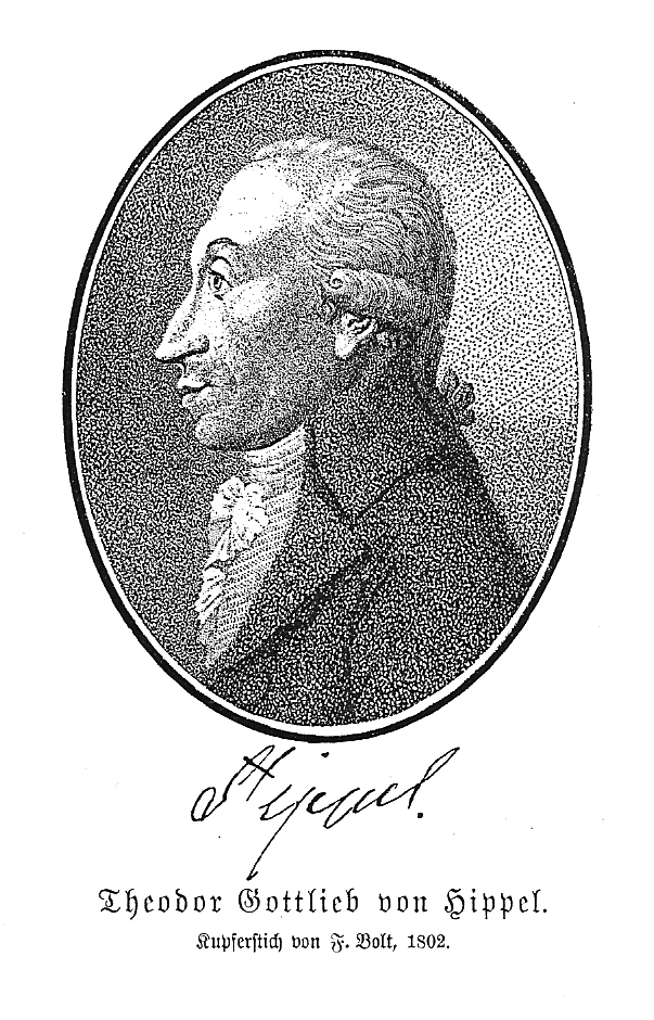 Theodor Gottlieb von Hippel Das Bild stammt aus Bilderatlas zur Geschichte der deutschen Nationallitteratur von Gustav Könnecke. Zweite, verbesserte und vermehrte Auflage. Marburg: Elwert 1895. Das Bild ist gemeinfrei. Für Wikipedia eingescannt und zur Verfügung gestellt von --Goerdten 23:20, 24. Nov. 2006 (CET)